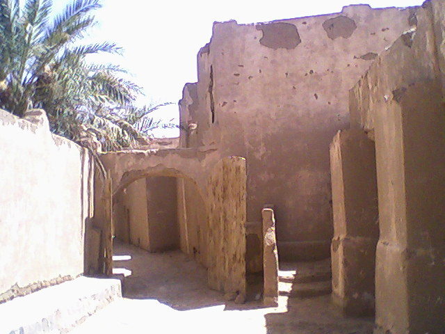 Une entrée du vieux Ksar a Béni-Abbés Algerie